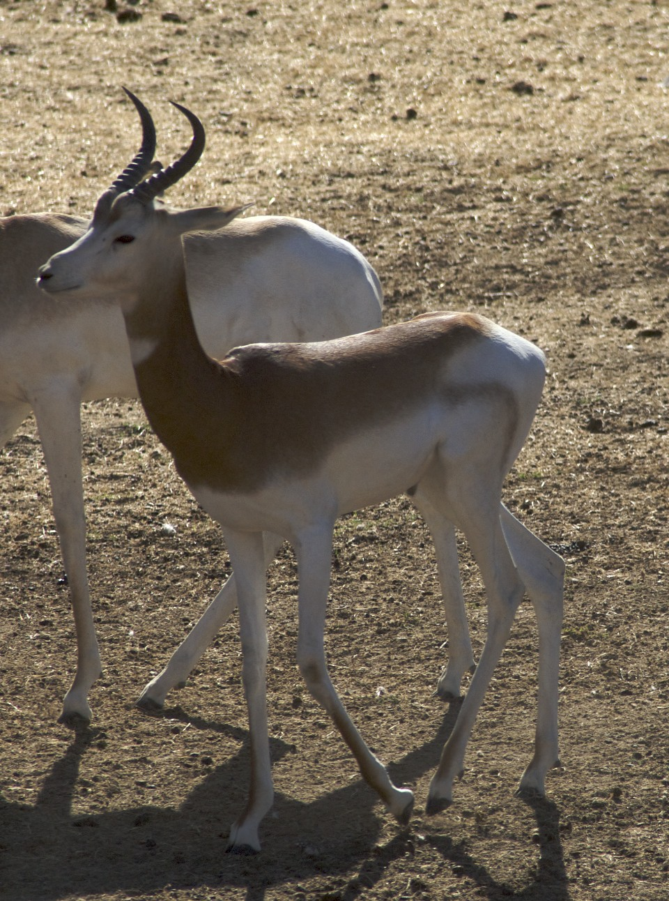 Gazella dama Dama Gazelle